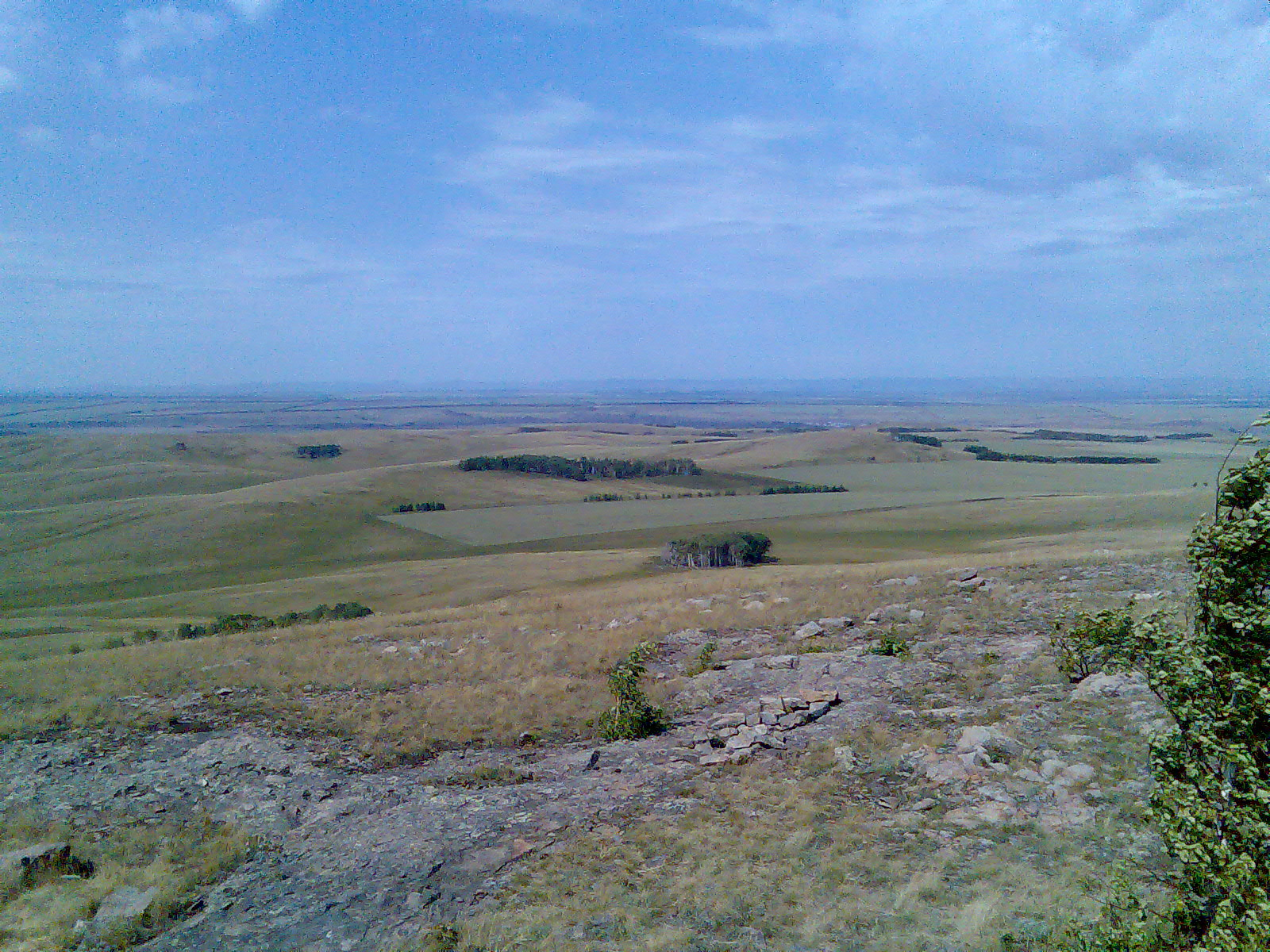 Вид в сторону Грязнушенского